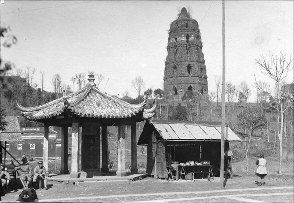 杭州雷峰塔，由瑪利諾神父攝於1920年間。